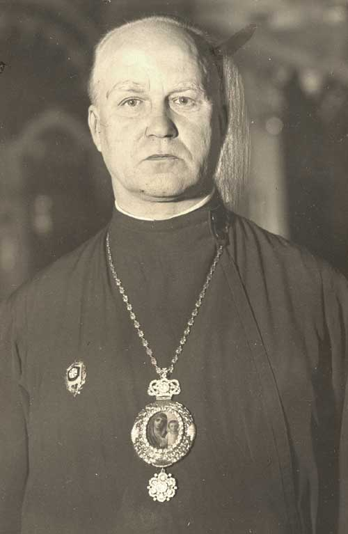 ortodoksisen kirkon arkkipiispa Herman